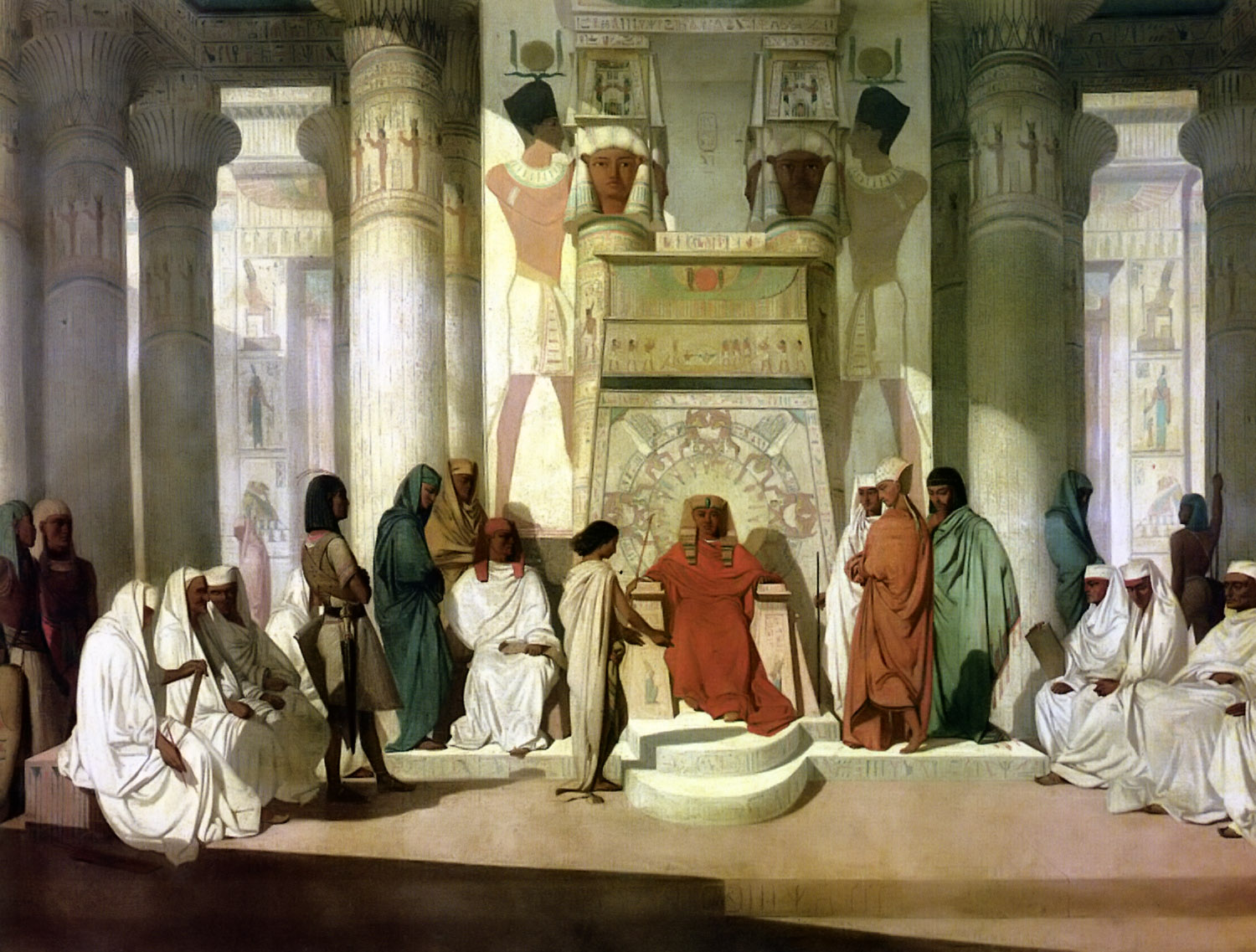 Joseph explains Pharaoh's dreamlabel QS:Len,"Joseph explains Pharaoh's dream" label QS:Lde,"Josef deutet dem Pharao seinen Traum" label QS:Lfr,"Joseph éxpliquant les rêves du Pharaon"